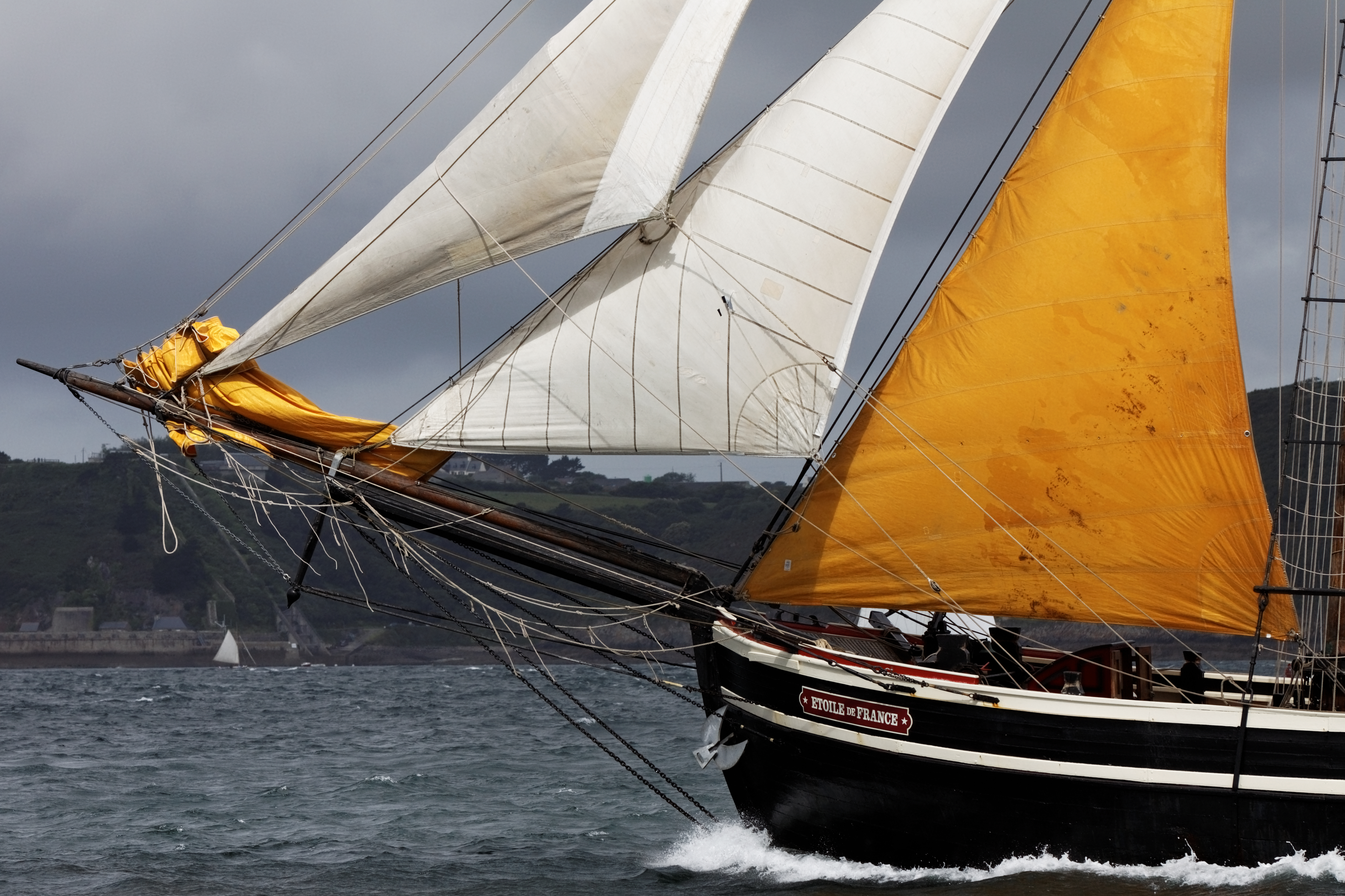 La grande parade des Tonnerres de Brest 2012 dans la rade de Brest en direction de Douarnenez.